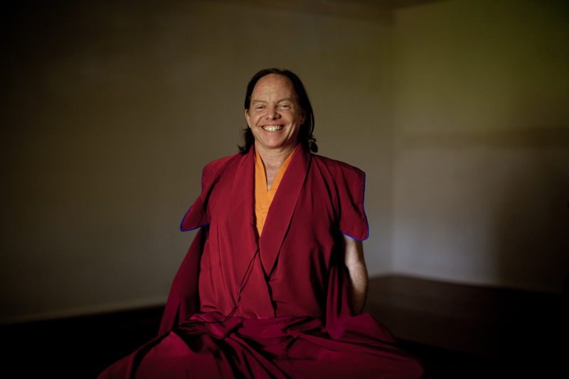 Geshe Michael Roach in Mönchsrobe